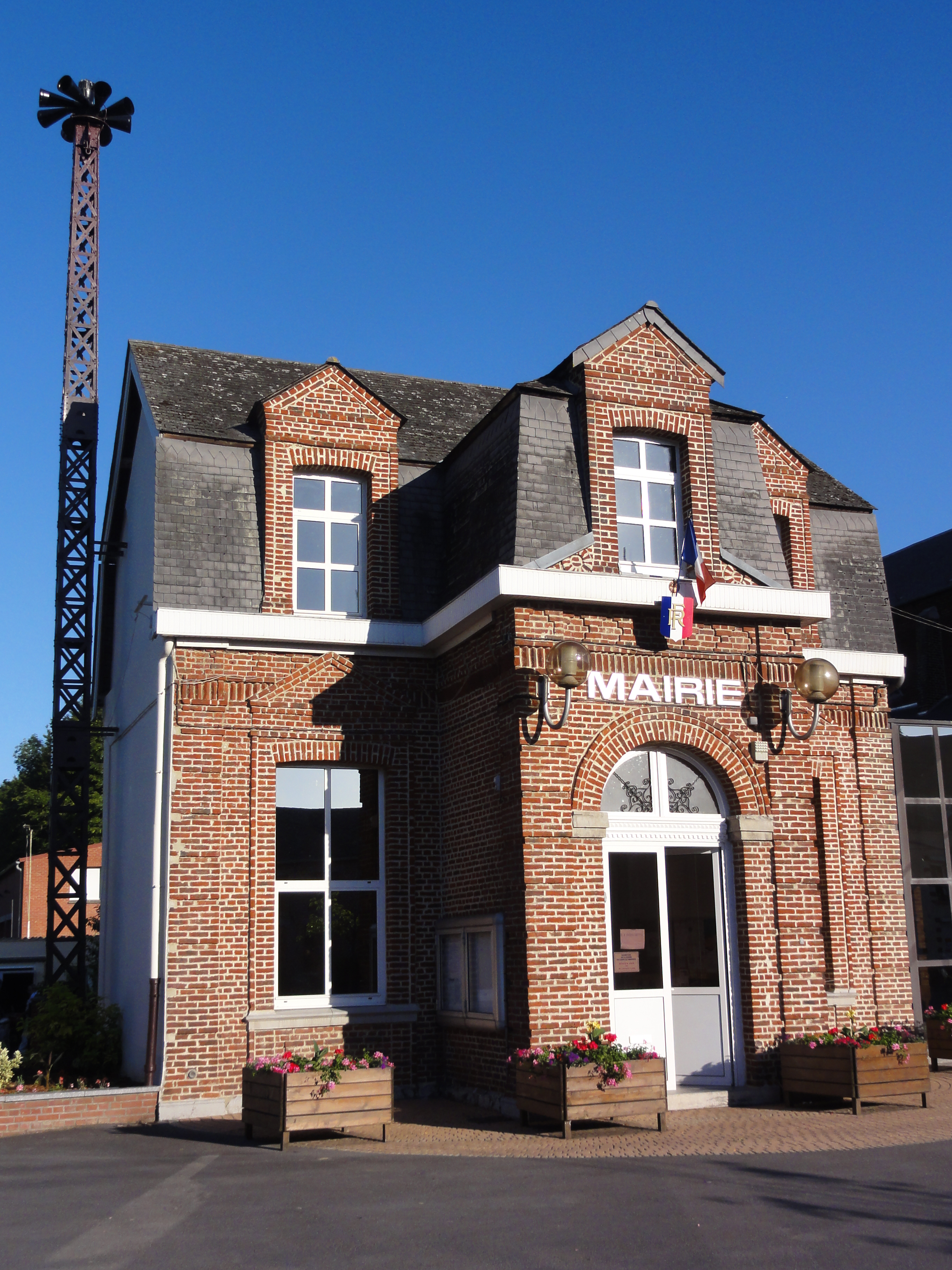 Neuf-Mesnil (Nord, Fr) mairie